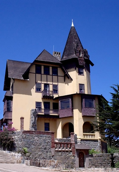 Edificio Recart Papudo